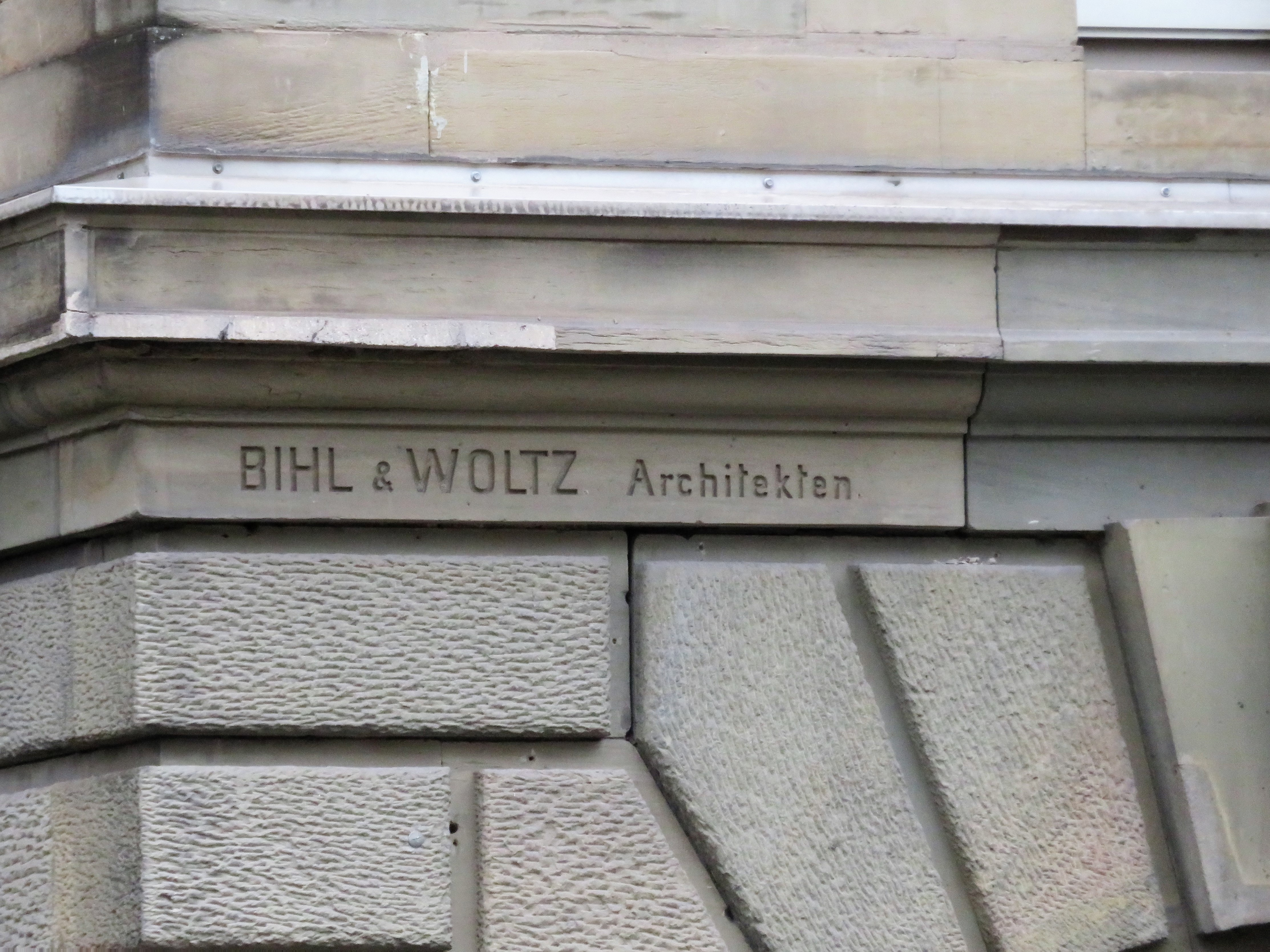 Schriftzug "Bihl & Woltz Architekten" am ehemaligen Verwaltungsgebäude des Allgemeinen DeutschenVersicherungsvereins, Olgastr. 18-24 in Stuttgart-Mitte